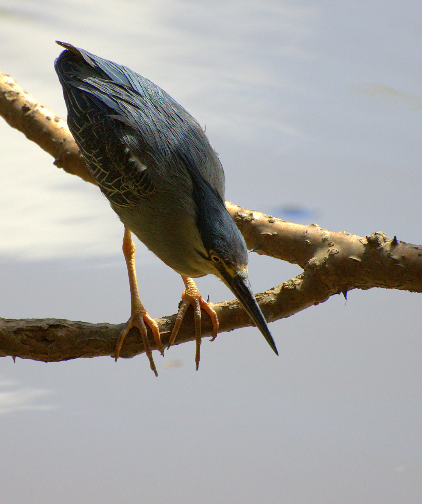 Butorides striata, Horto Florestal em São Paulo